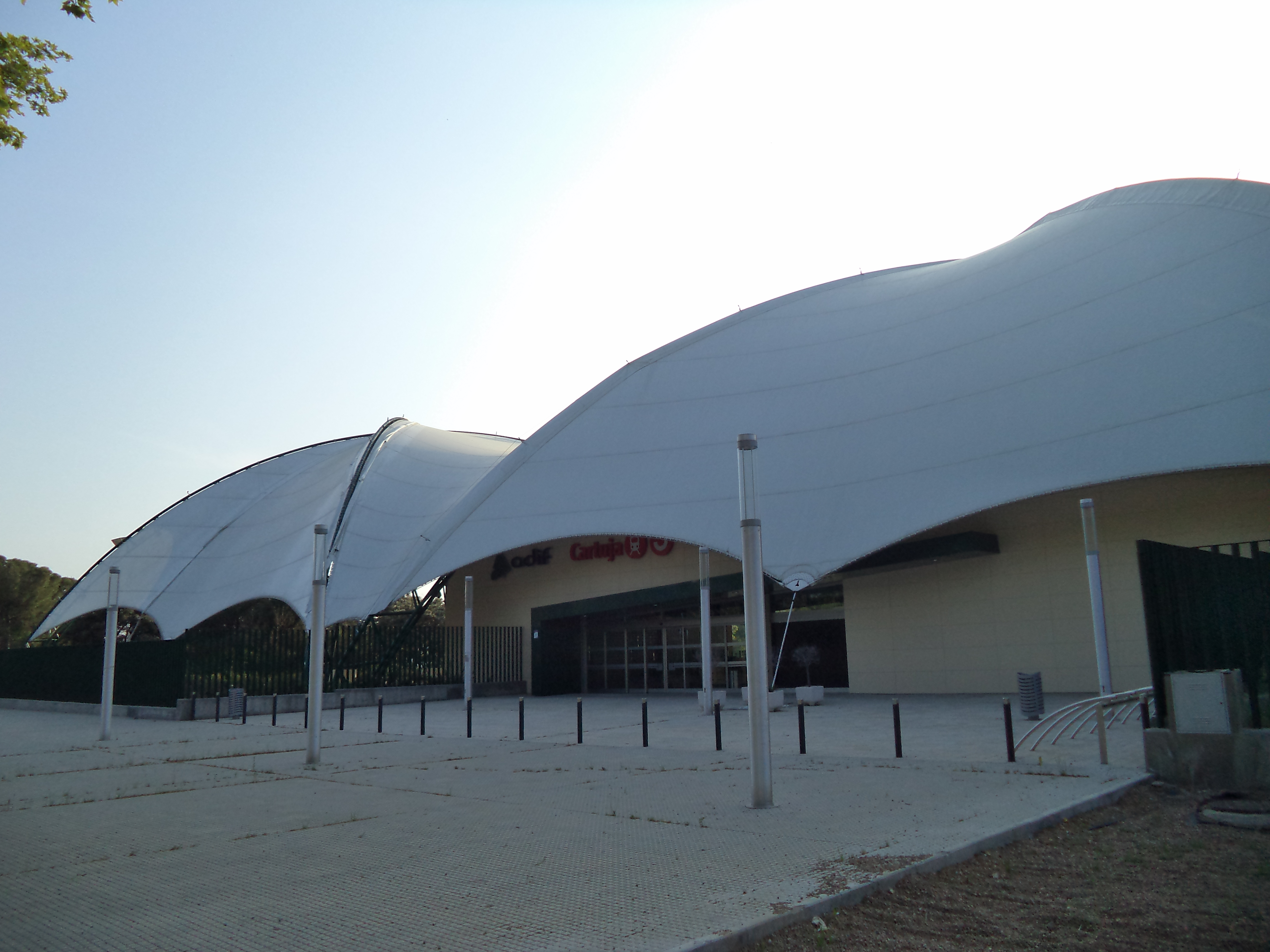 Apeadero del AVE y cercanías de Expo 92 en la La Cartuja, que fue reconvertida en 2012 en la estación de la Cartuja de Cercanías Sevilla.